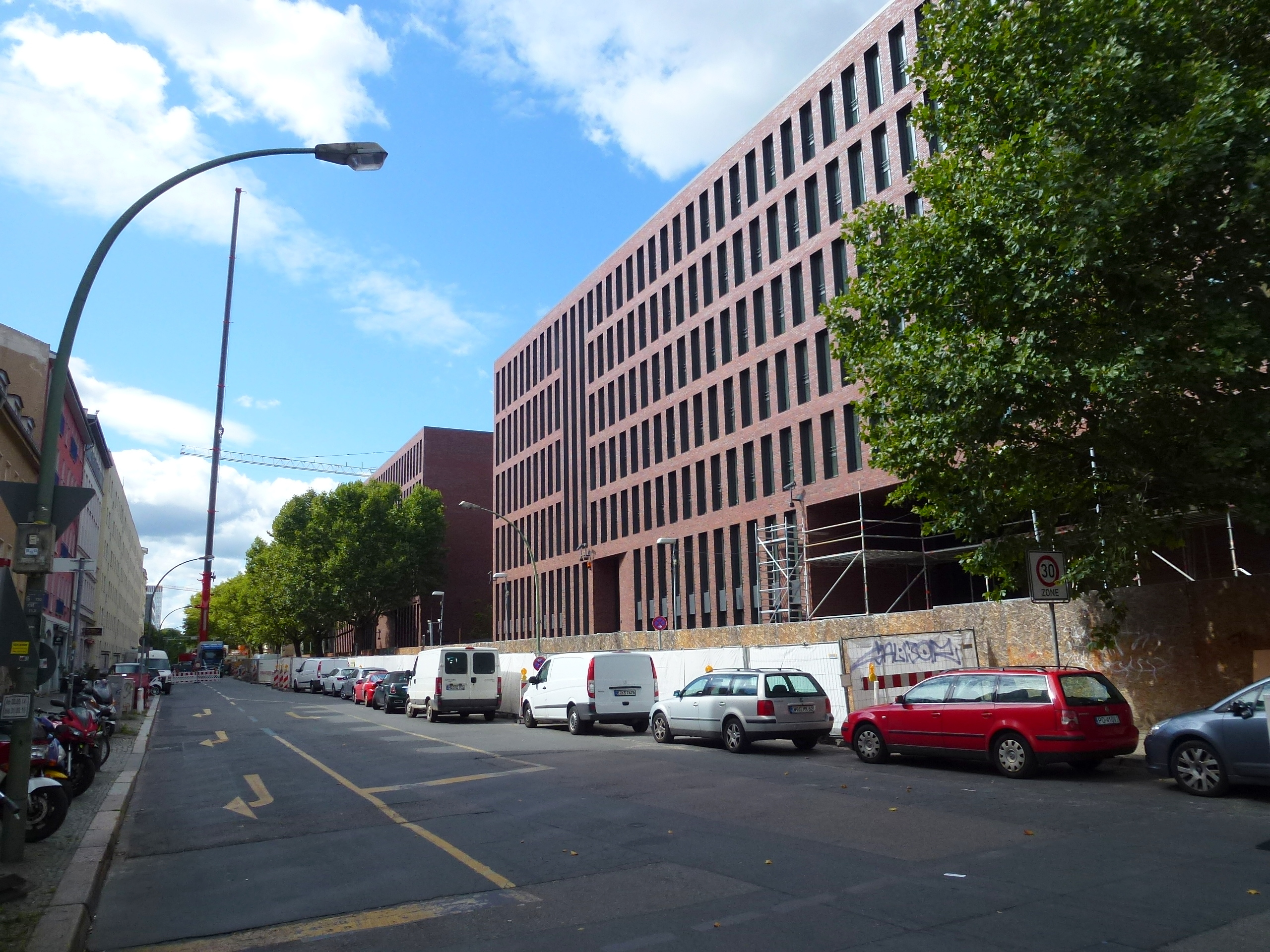 Berlin-Mitte Habersaathstraße BND-Gebäude